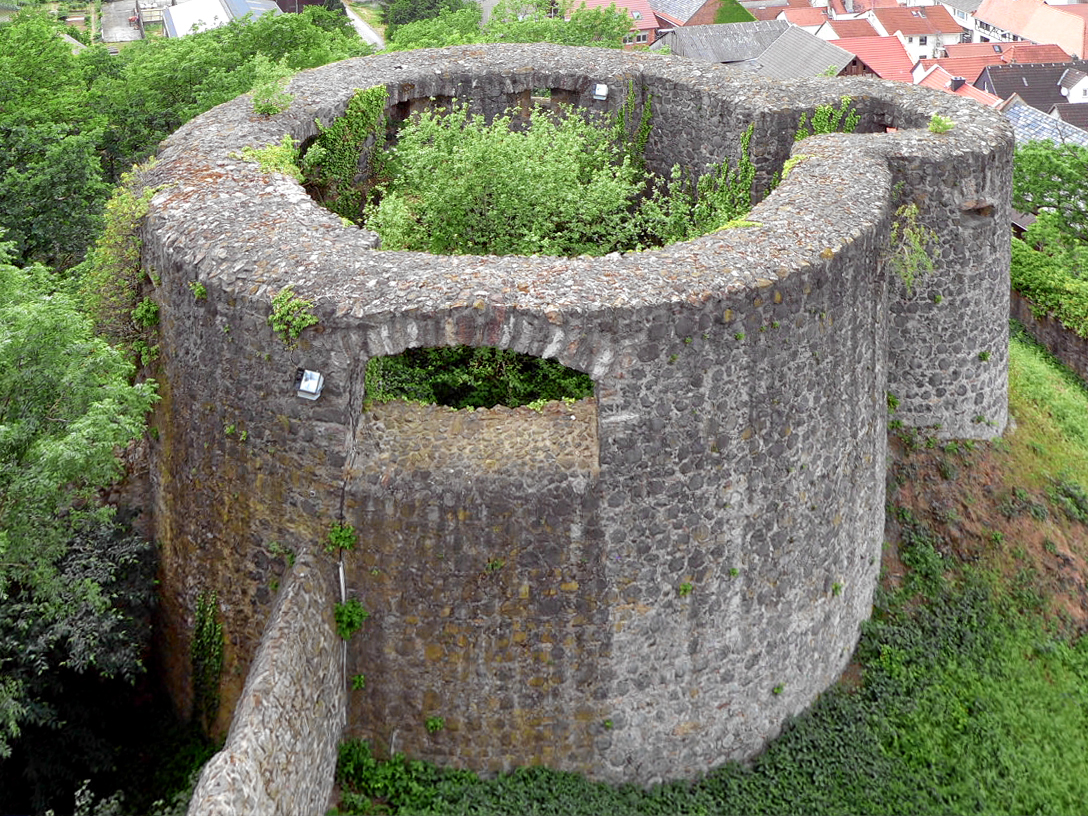 Burgruine Münzenberg, Hessen, Germany